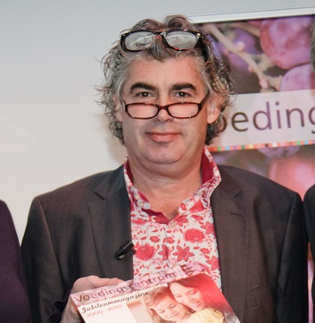 Nederlands voormalig PvdA-politicus Rob Oudkerk